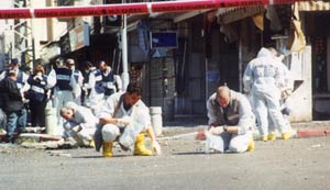 תמונות ממקום הפיגוע בנתניה